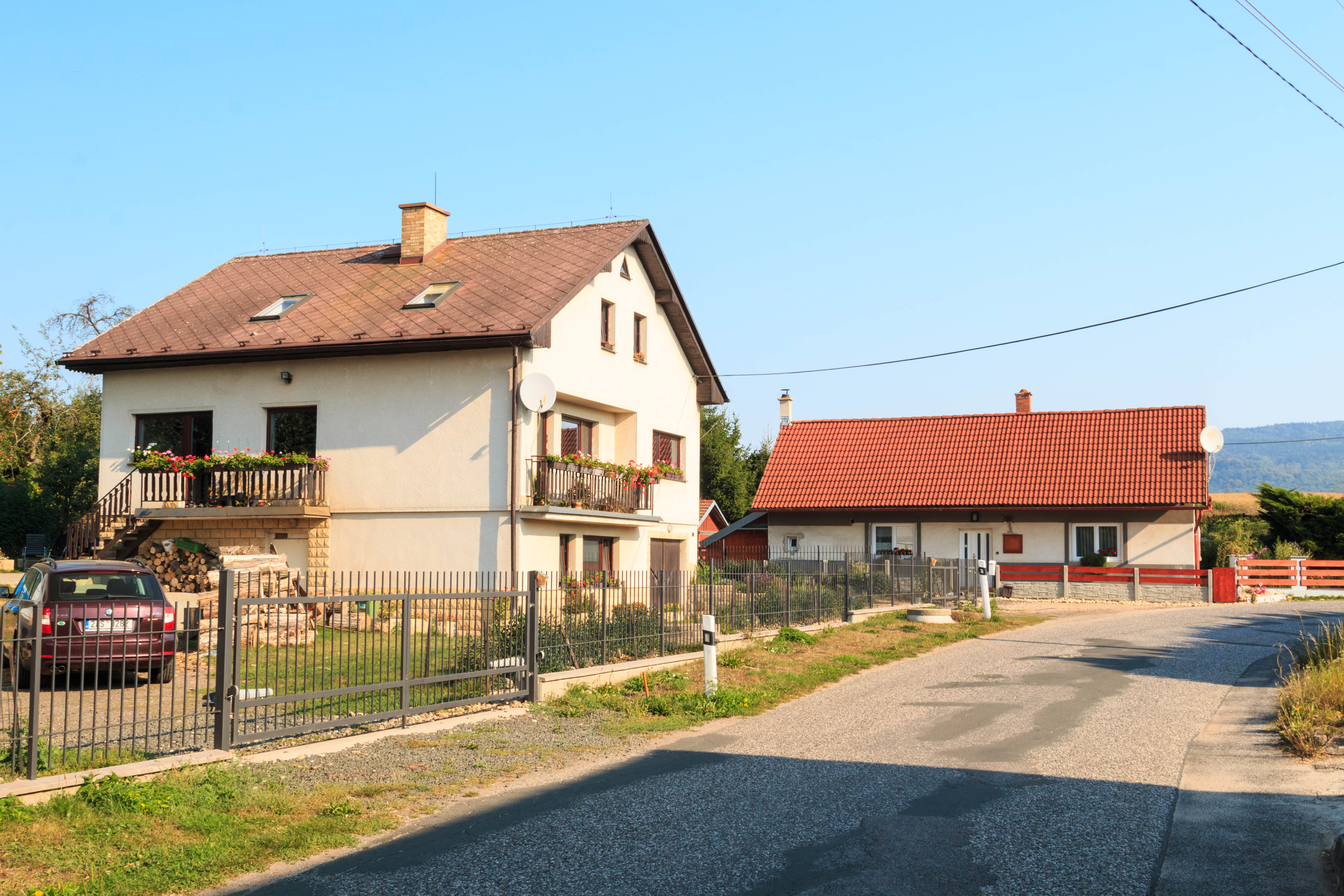 Dolní Podůlší - čp. 3